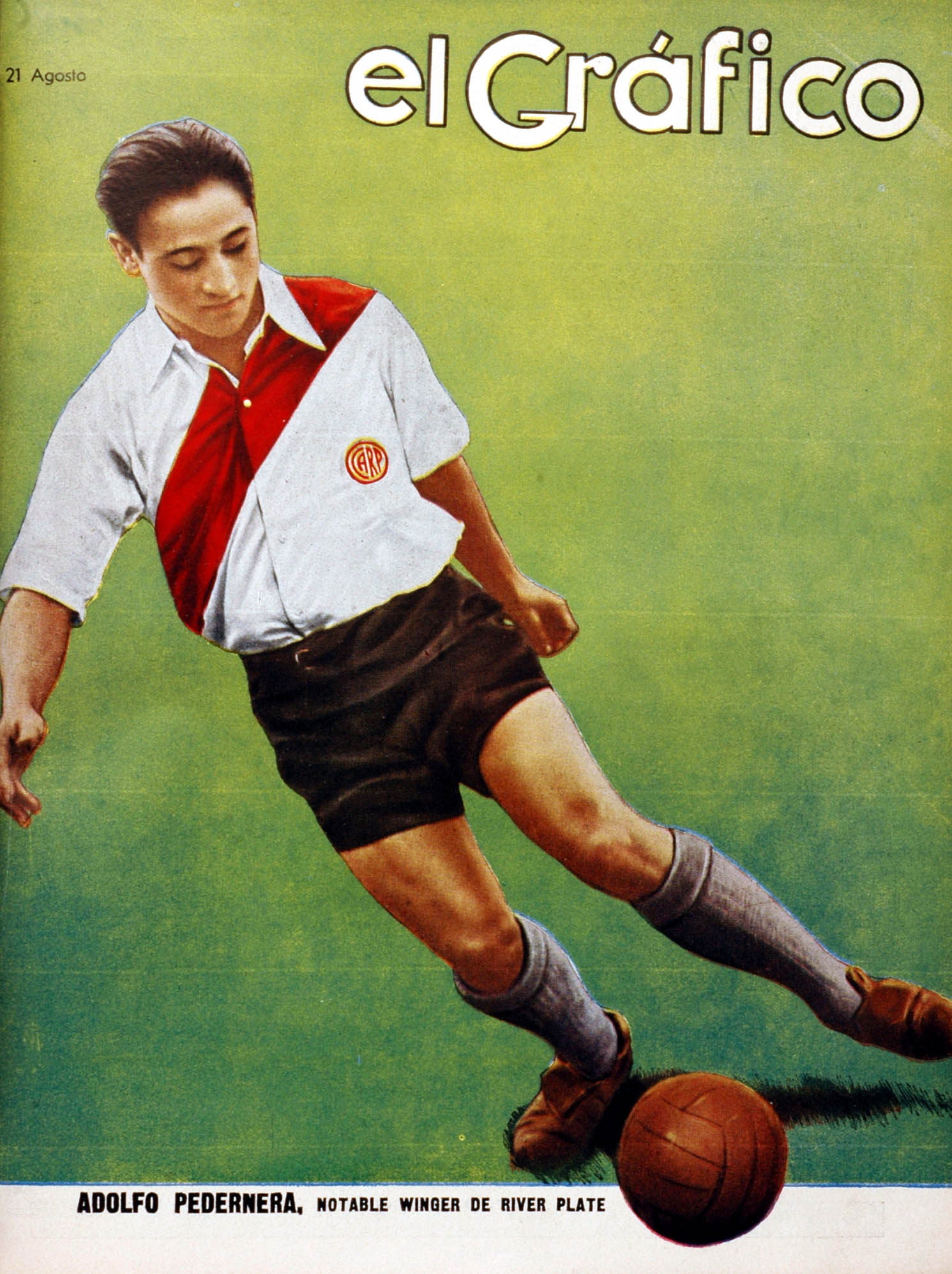 El Grafico del 21 de Agosto de 1937. Edicion 945